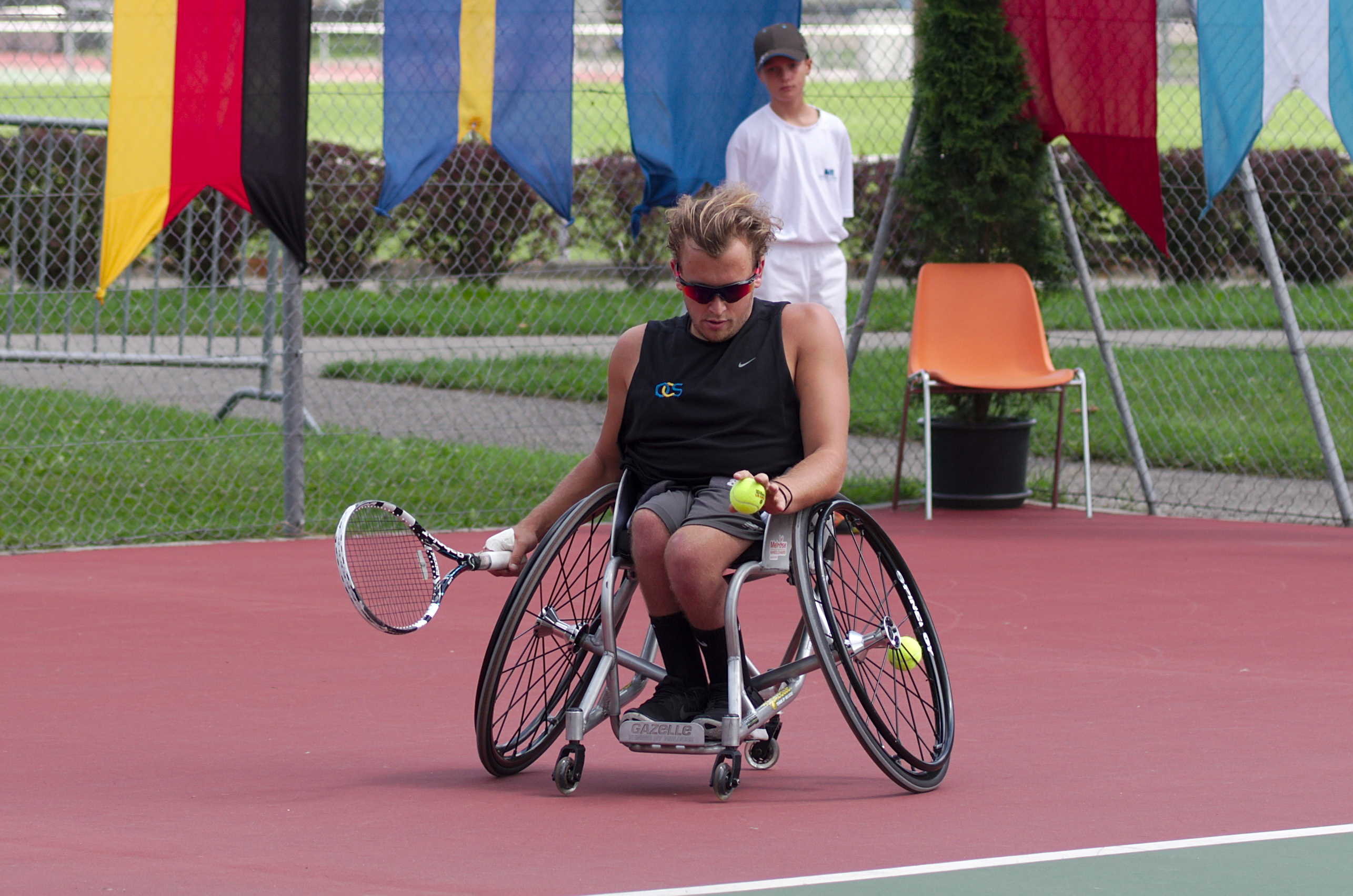 Swiss Open Geneva - 20140712 - Semi final Quad - D. Wagner vs D. Alcott